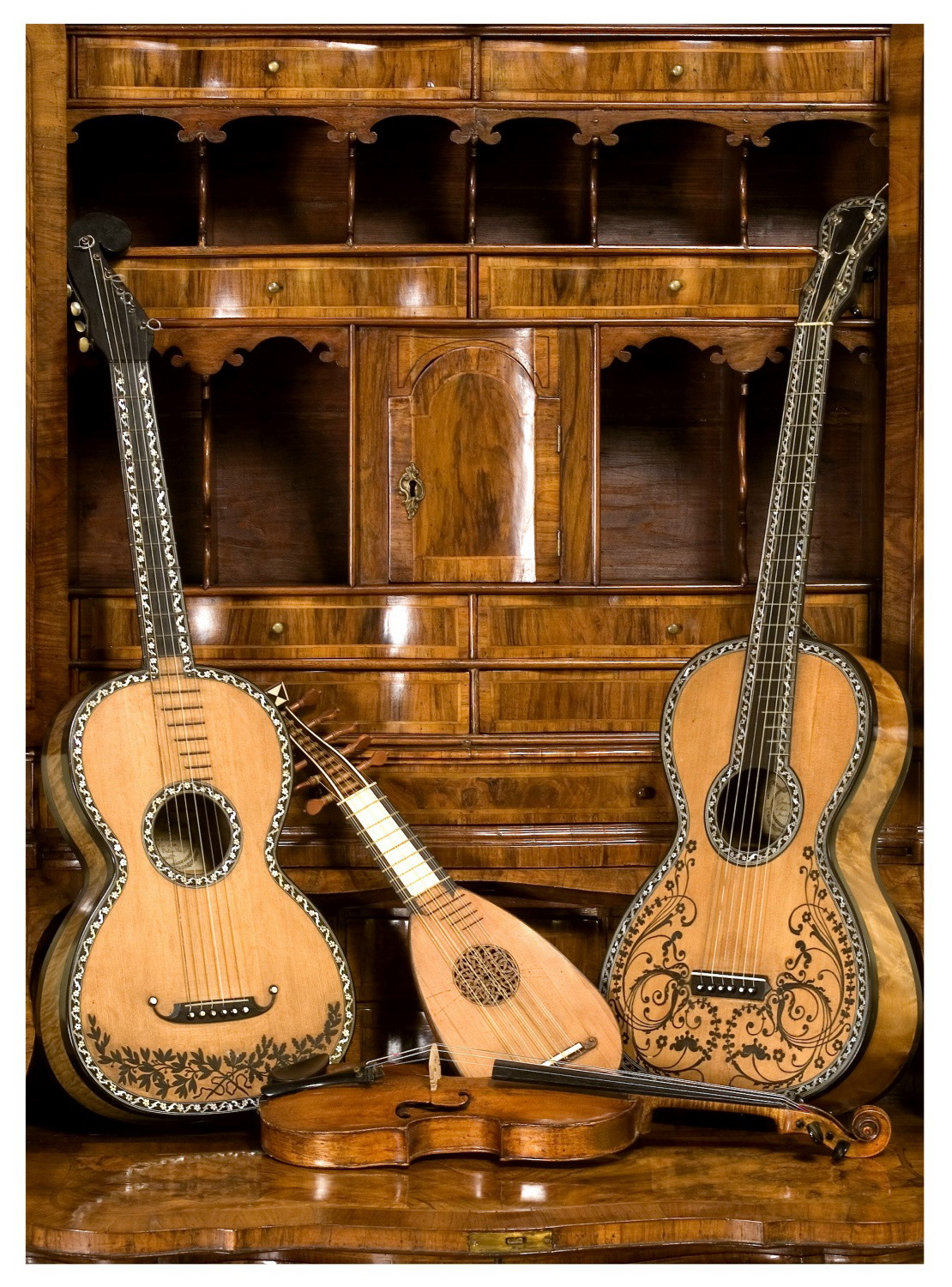 Instrumente aus der Privatsammlung